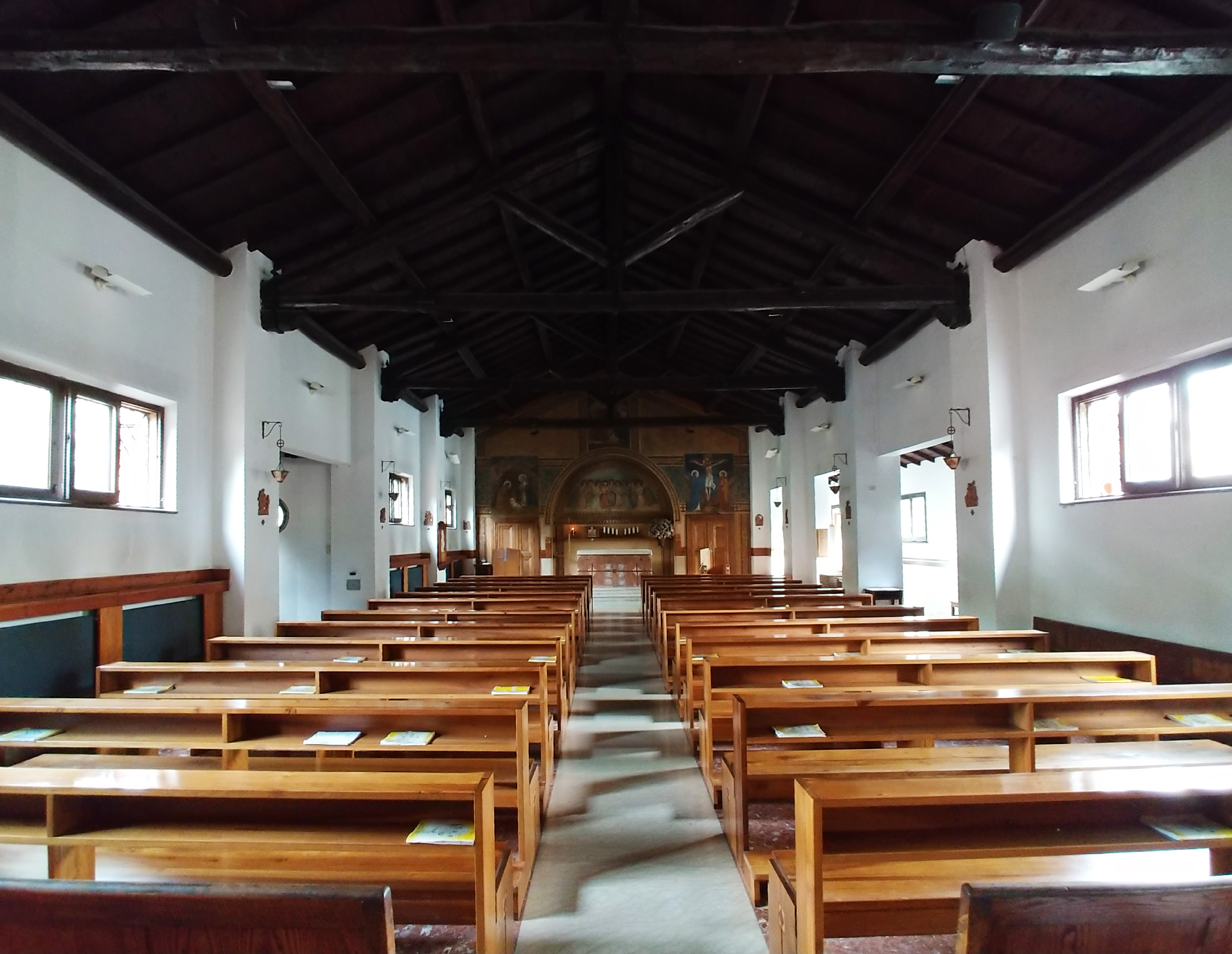 Interno.